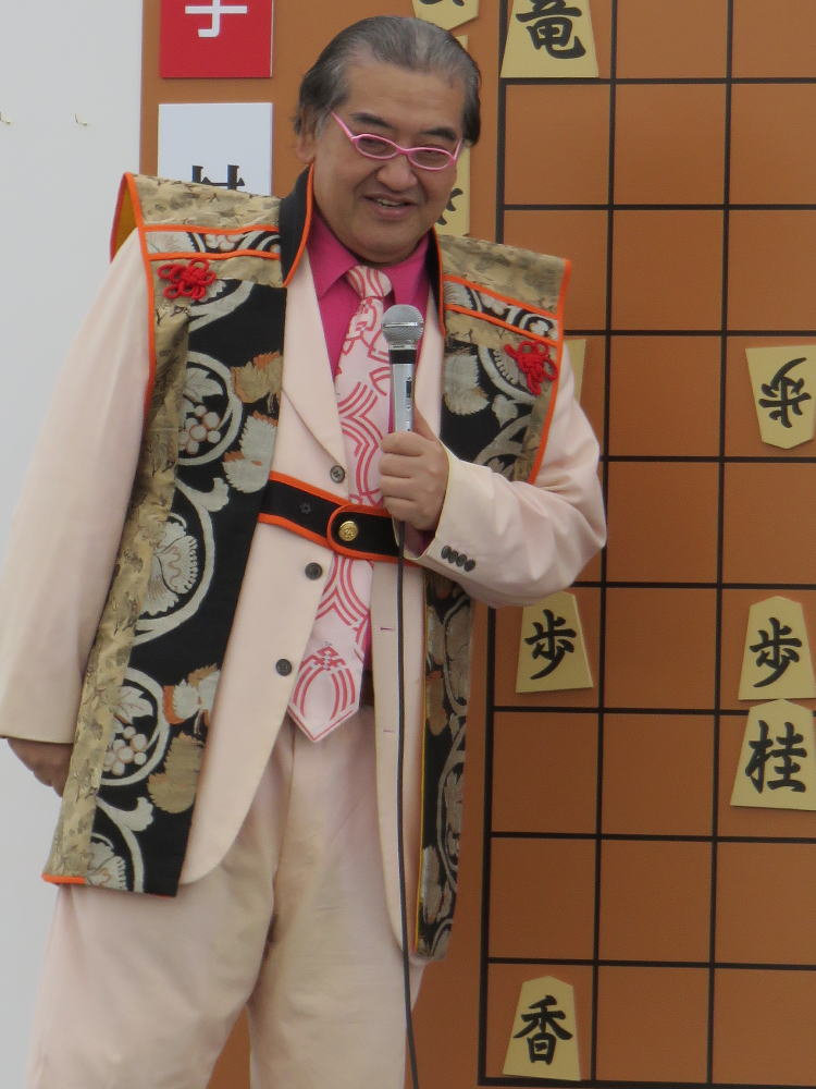 将棋棋士の神吉宏充（平成27年11月28日、姫路市で行われた人間将棋にて）